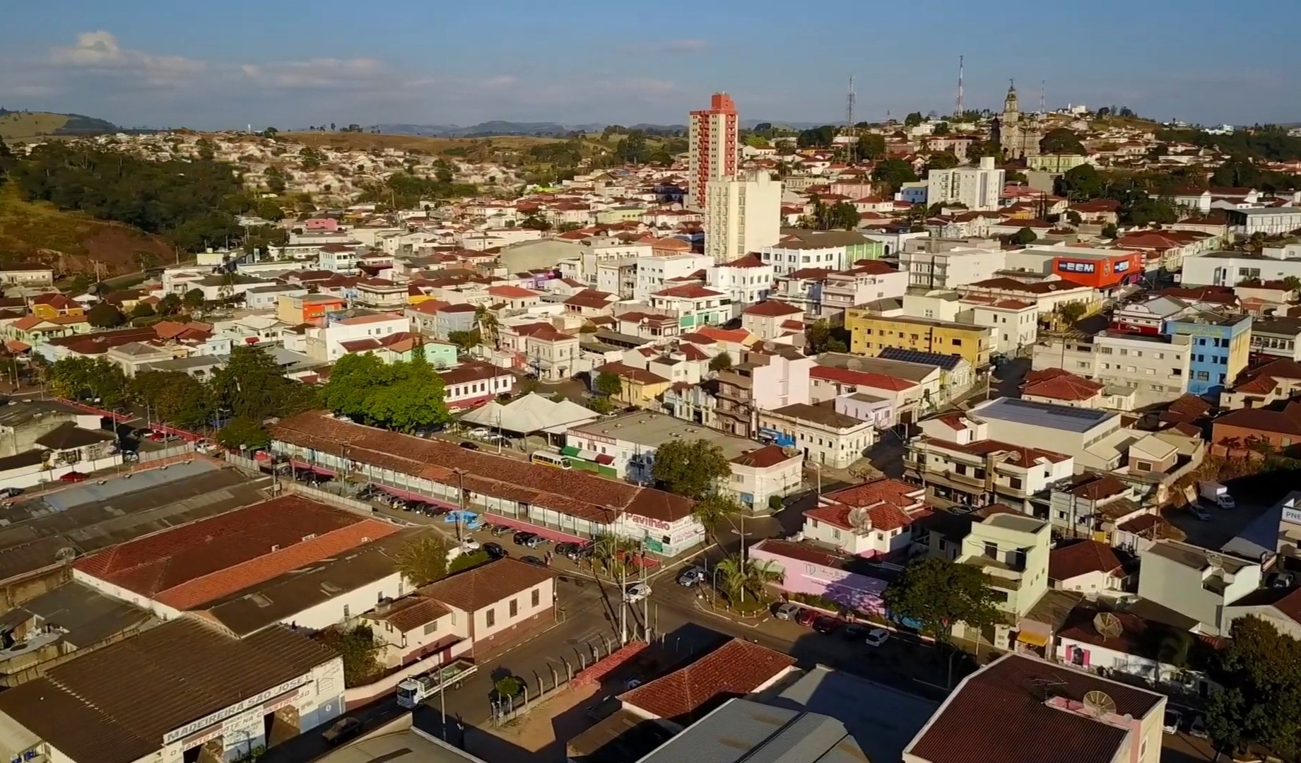 Ouro Fino Minas Gerais, Brasil